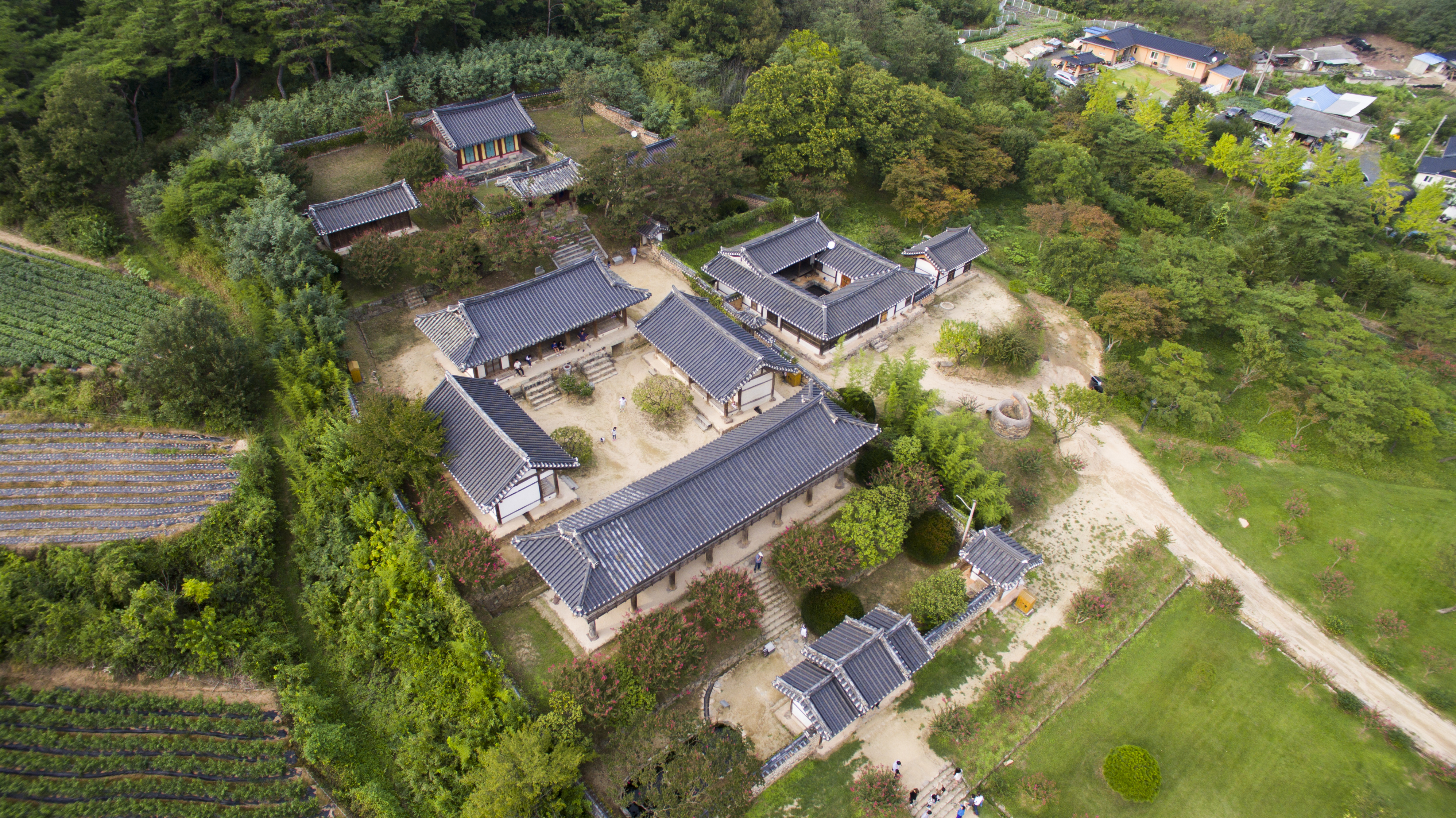 병산서원 항공촬영